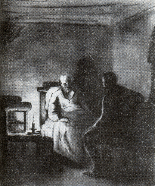 Иллюстрация к рассказу "Честный вор"